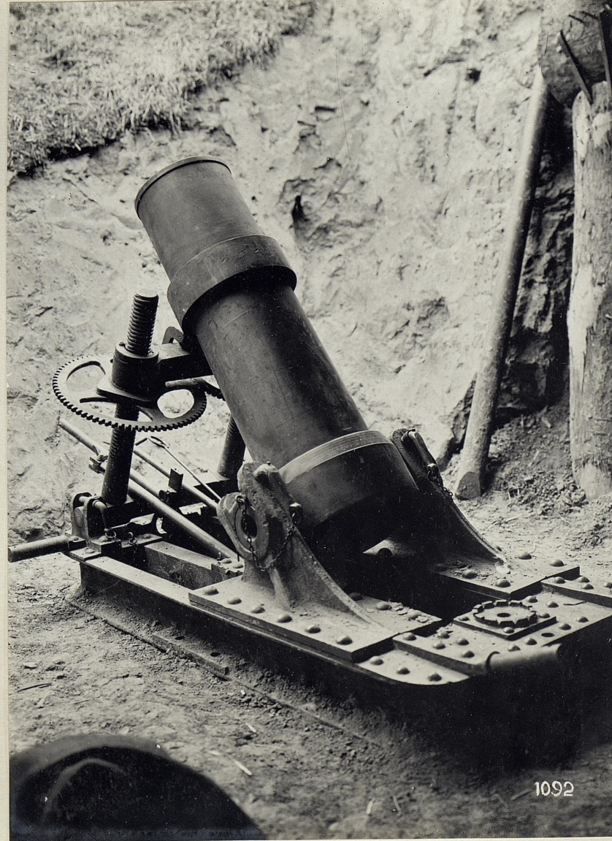 Schwere Minenwerfer, möglicherweise nahe eines Schiessstandes bei Kowel